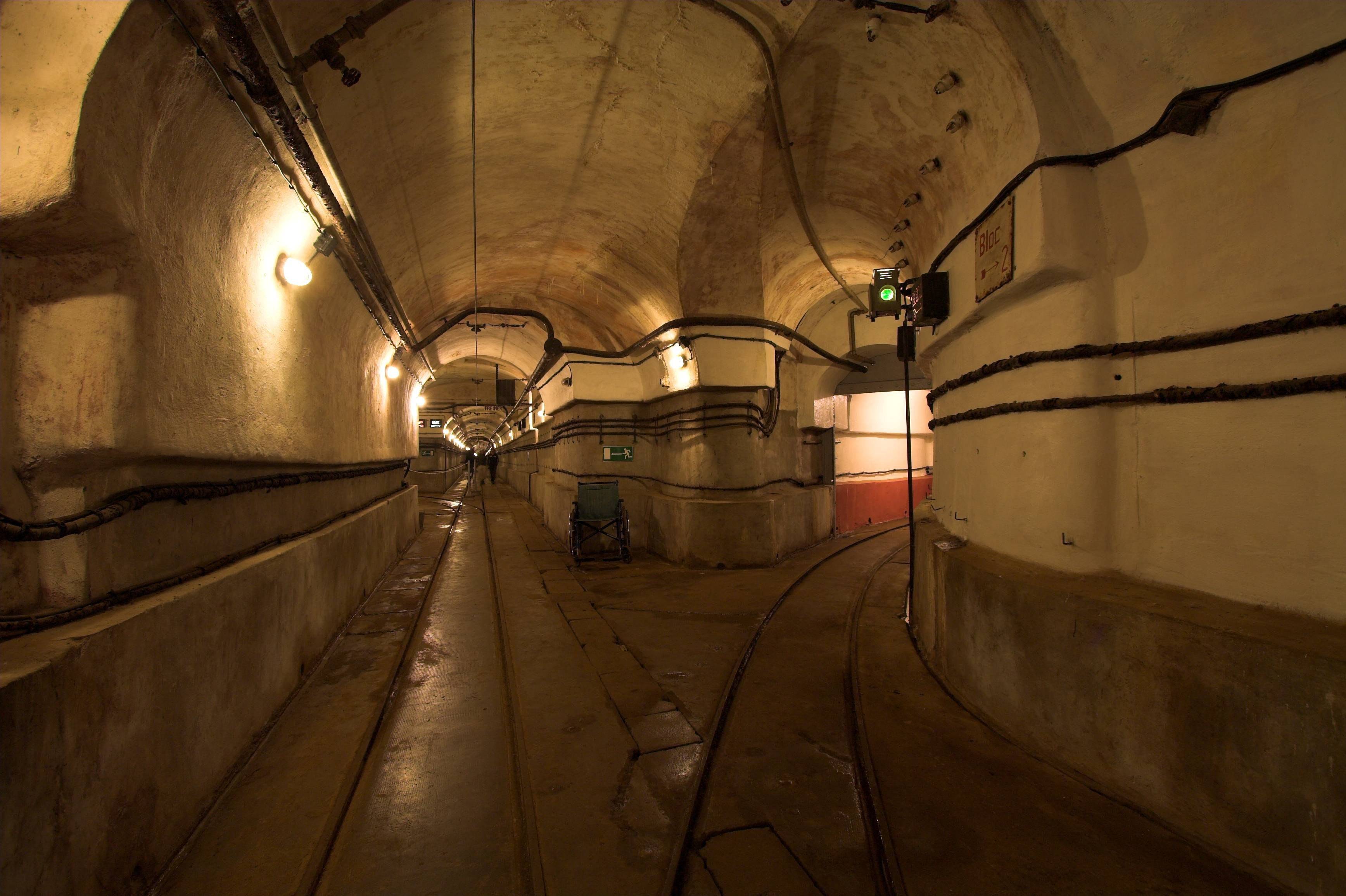 Fort Shoenenbourg(Schoenenbourg, France)